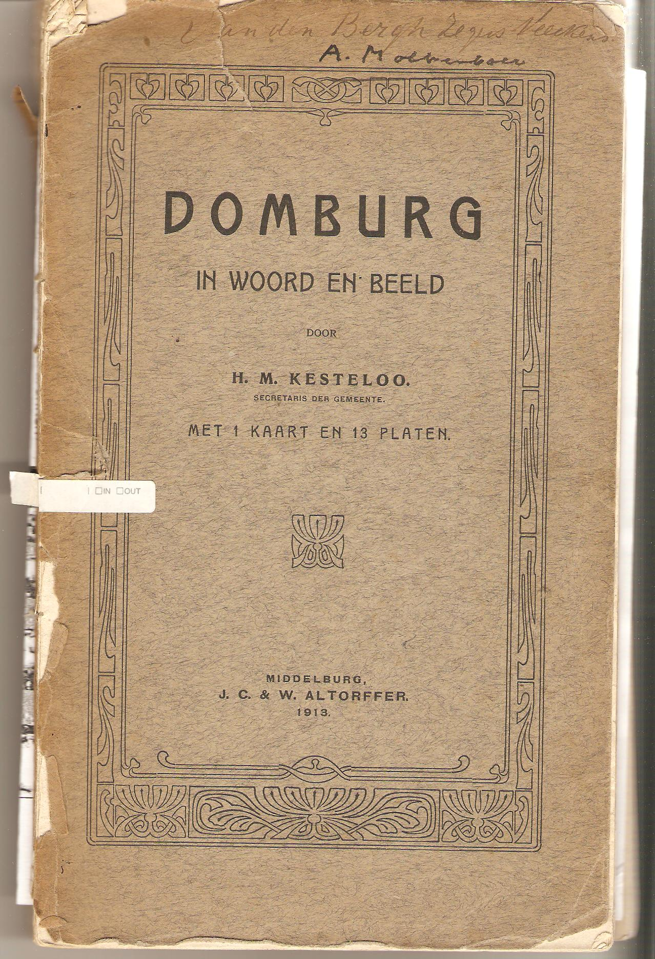 Bookcover scan from original